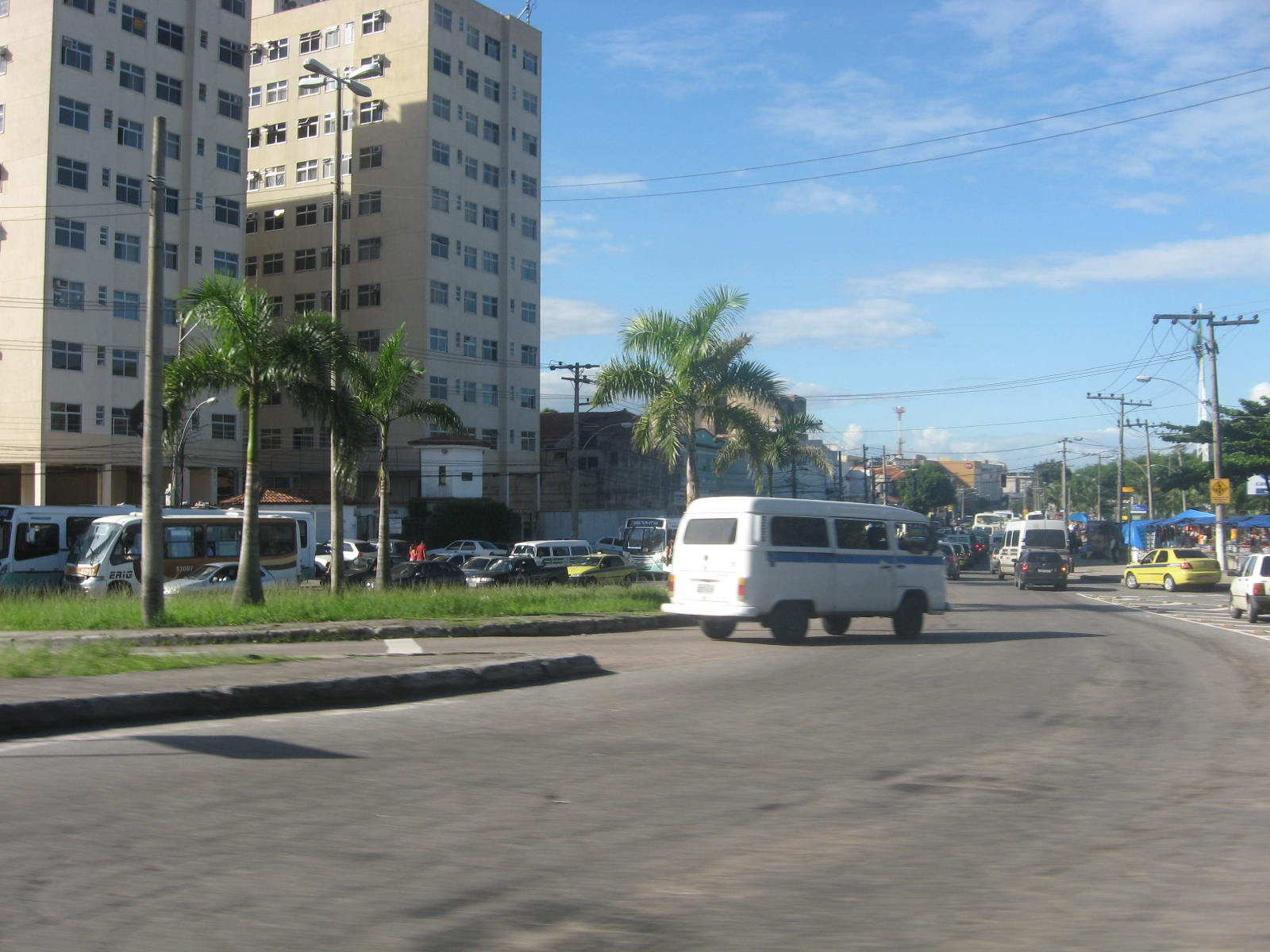 Bairro carioca de Vicente de Carvalho, localizado na zona norte da cidade do Rio de Janeiro.